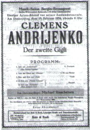 Програма концерту Клима Чічки-Андрієнка в музичному салоні Берліна. 15 лютого 1934 року.